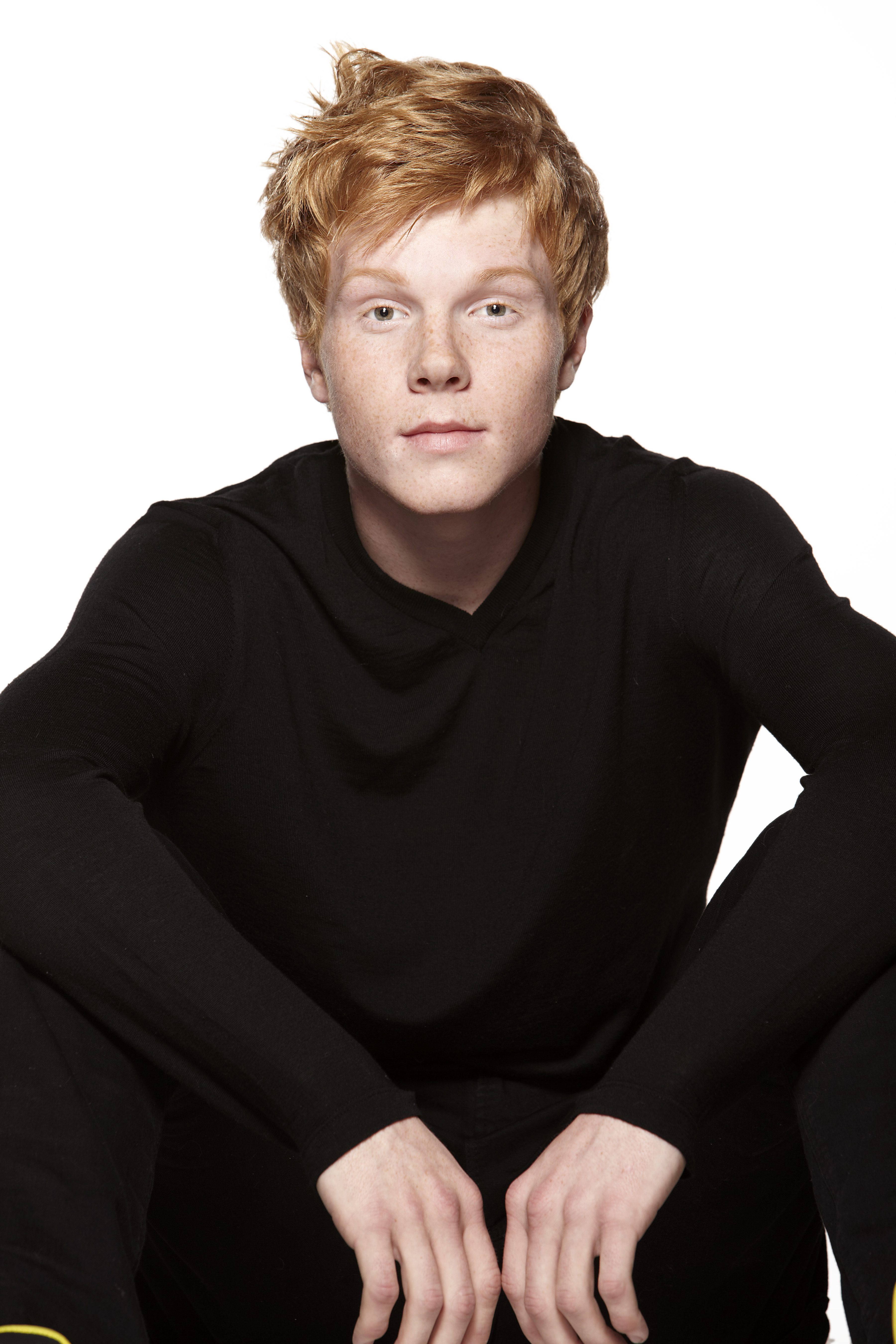 Adam Hicks